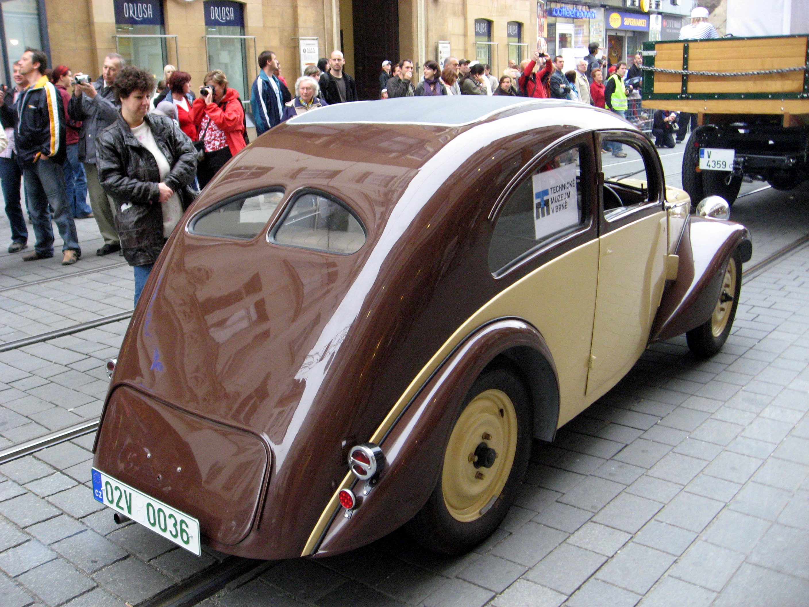 Historický automobil v centru Brna Z6 (1935/36) ("Hurvinek"), 0,7-l-engine, two cylinders, two stroke, 19 hp, front-wheel drive, ca. 500 cars built, ca. 13 are still existing